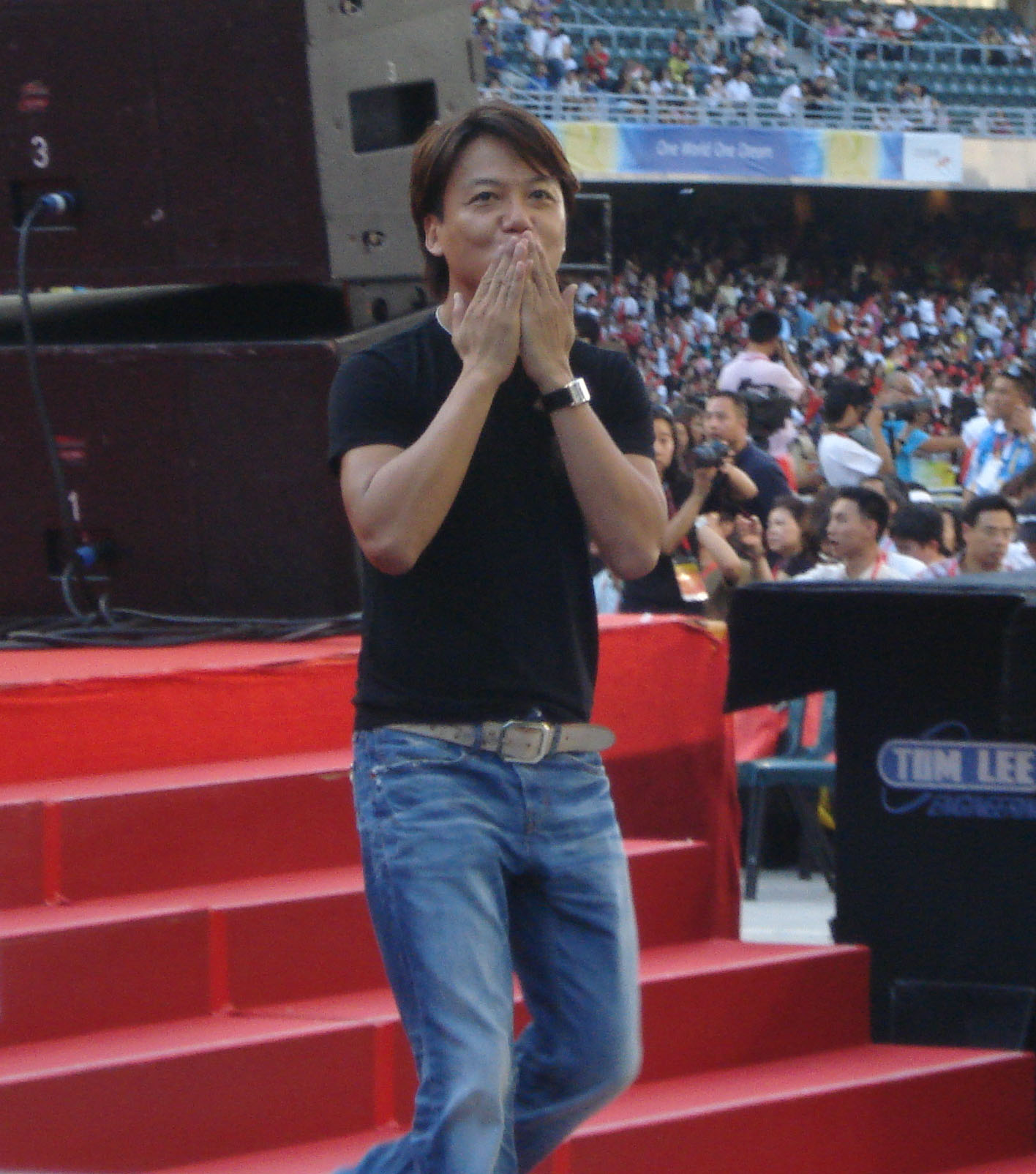 Eddie Ng (吳國敬)